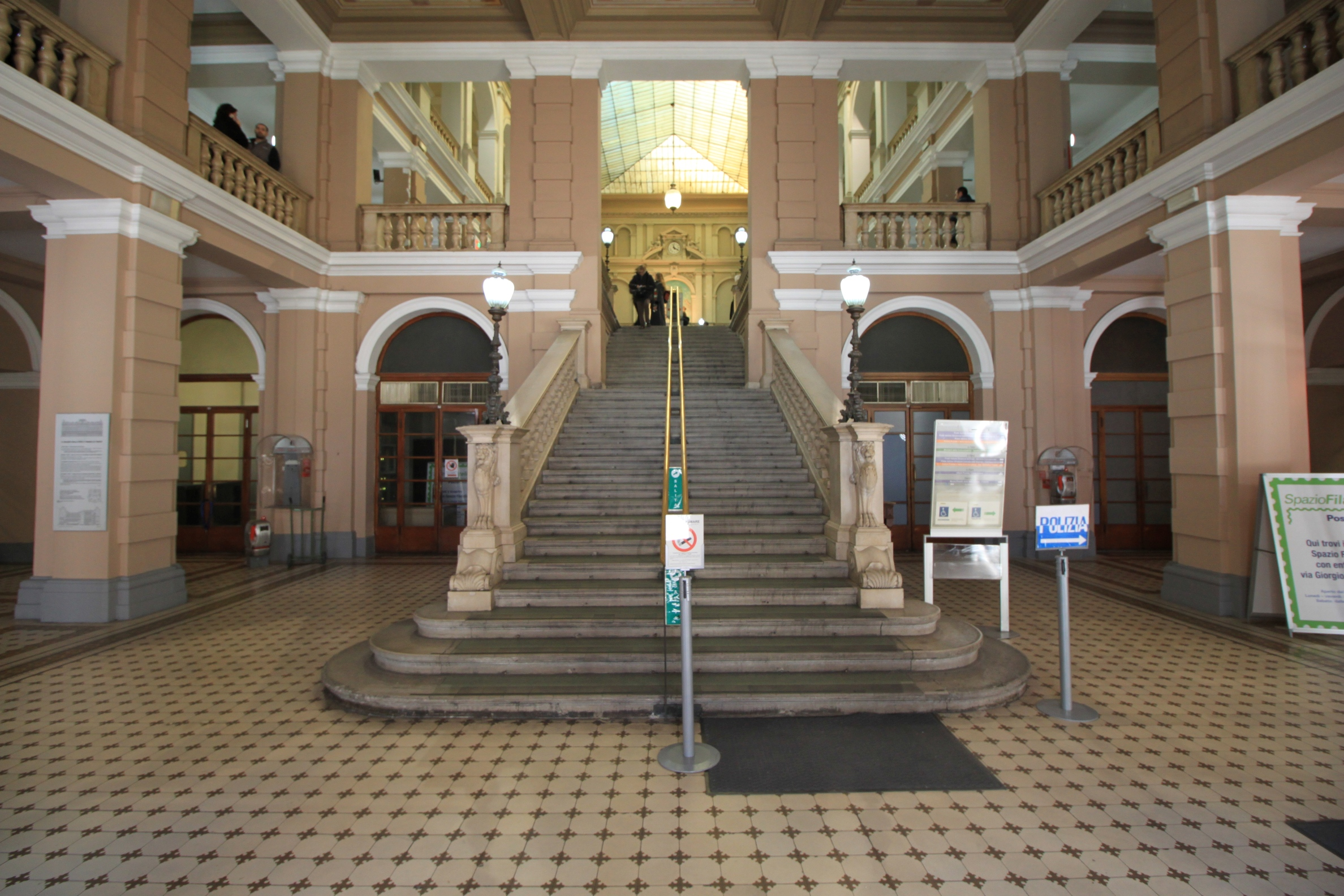 Palazzo delle Poste, Piazza Vittorio Veneto, Trieste; Interiore